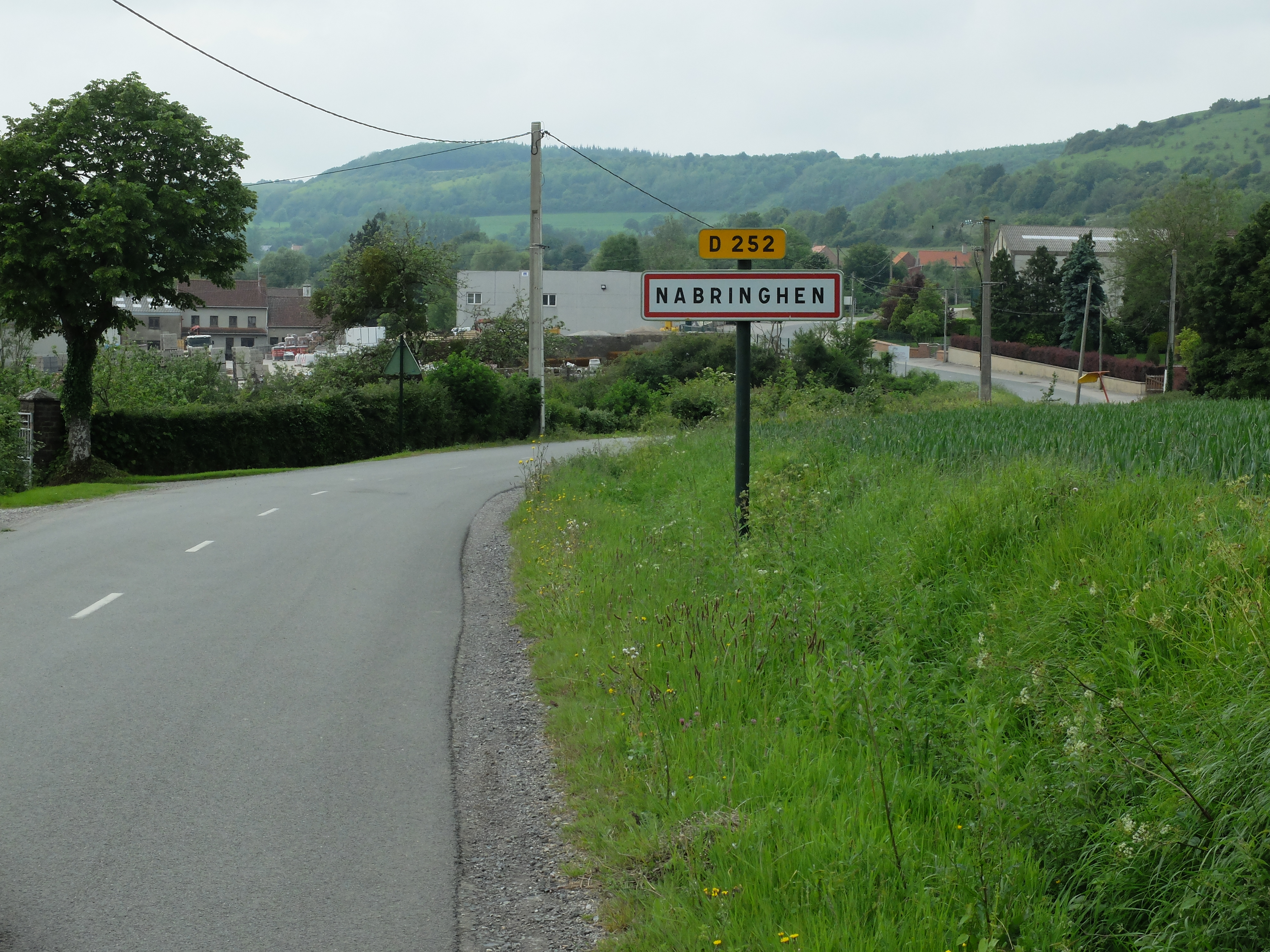 Vue d'une entrée de la commune de Nabringhen.